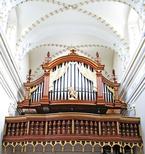 Орган в Полонському костелі